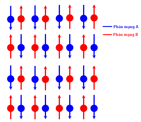 Hình này do Deshi tạo ra